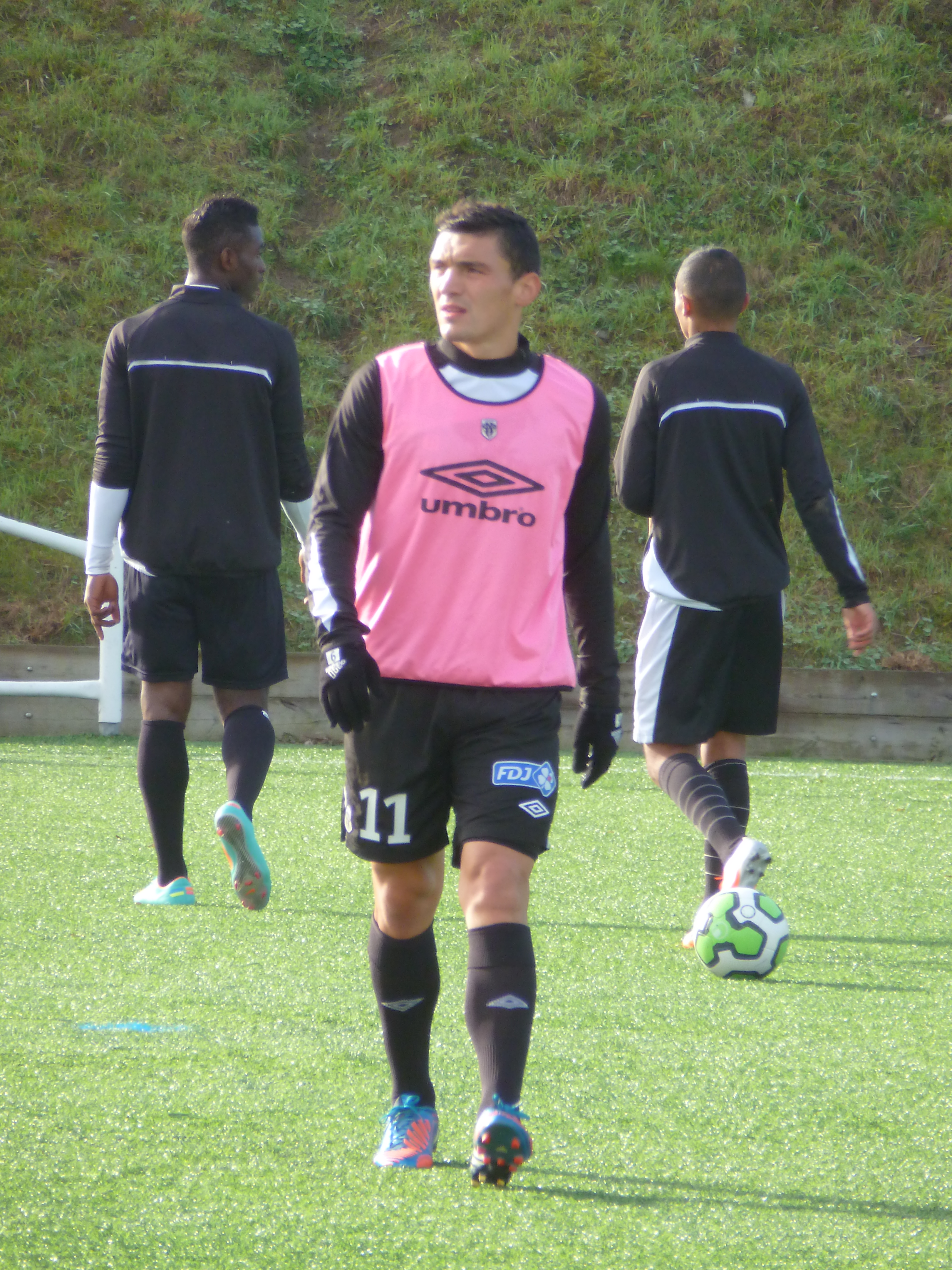 Keserü à l'entrainement en novembre 2012